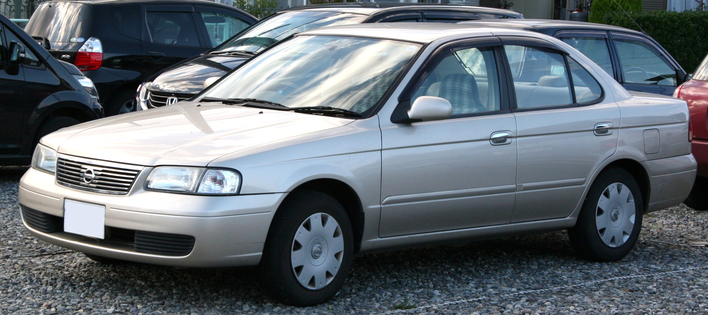 Nissan Sunny